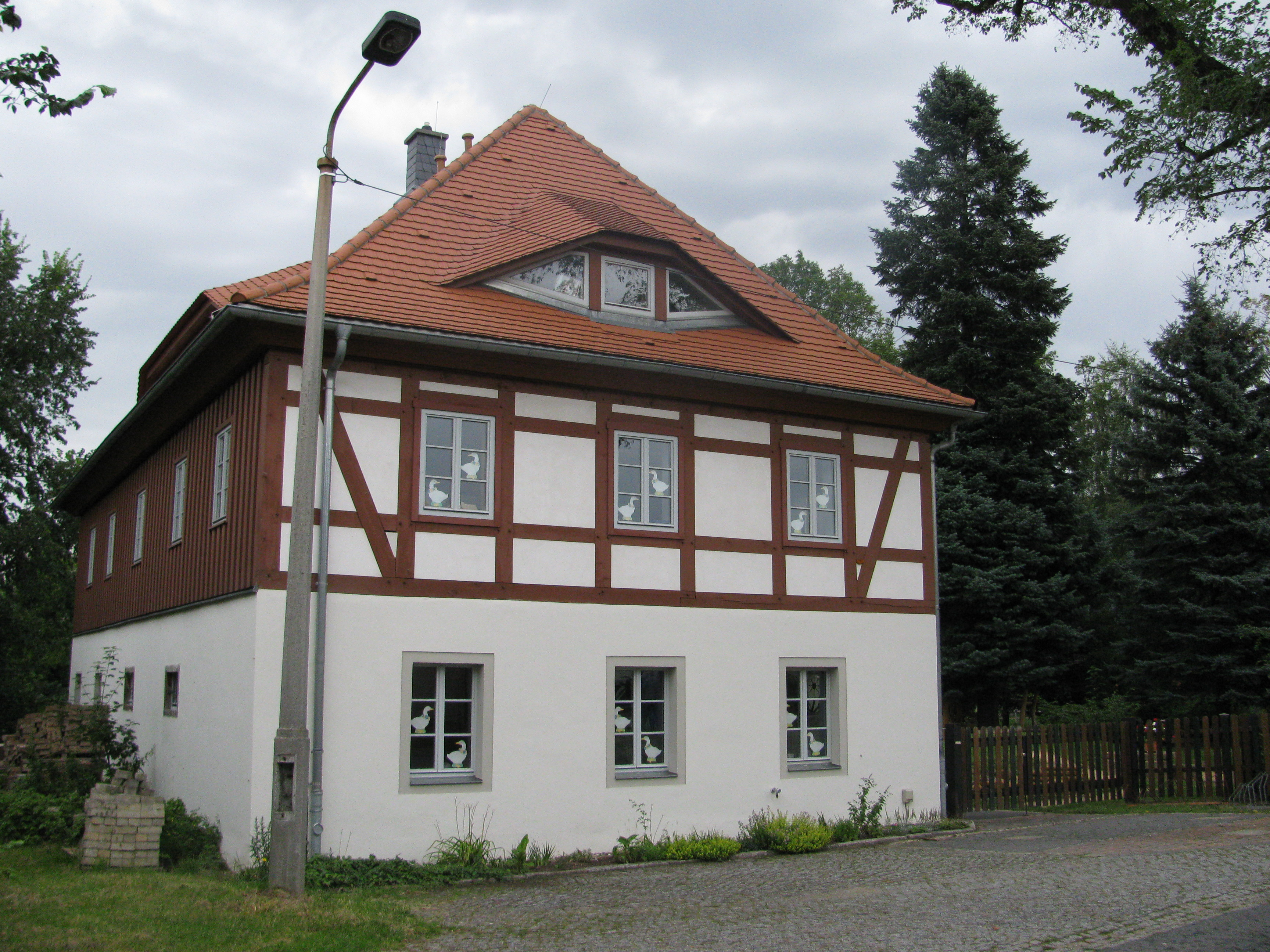 Kindergarten in Steinbach, Gemeinde Moritzburg, Sachsen. Eines der ältesten Gebäude im Ort.